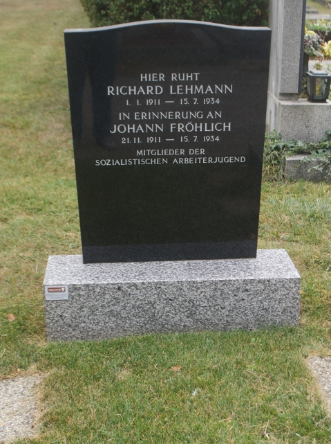 Richard Lehmann-Liesinger Friedhof (66A-38)